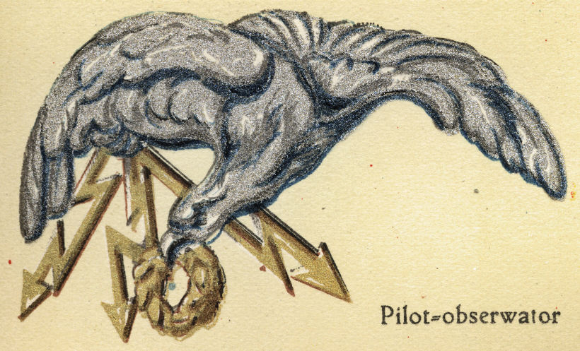 Odznaka Pilota-Obserwatora 1928.